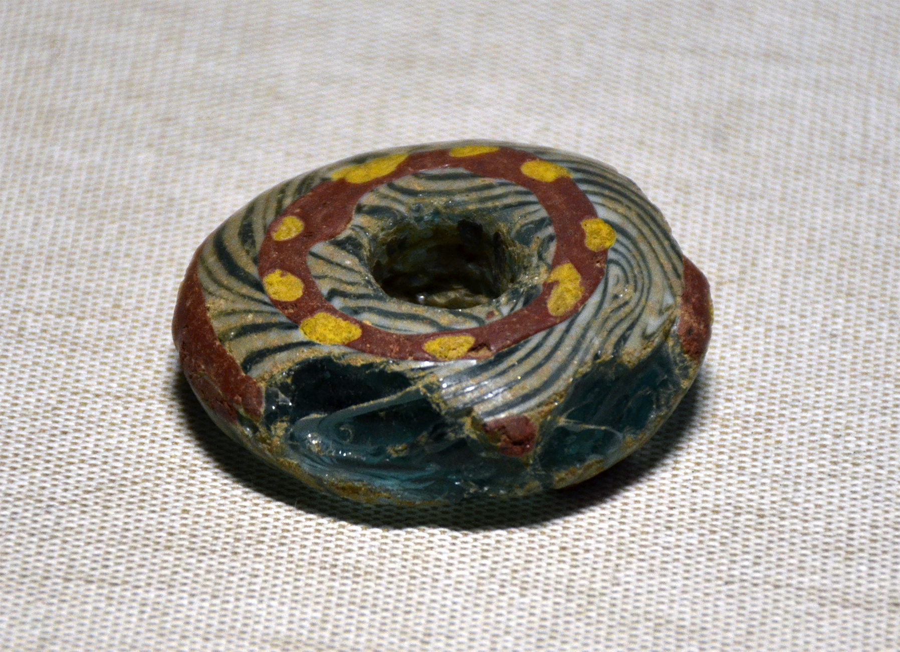 Grosse perle annulaire en pâte de verre, époque mérovingienne, provenance inconnue. Musées de la Cour d'Or à Metz.